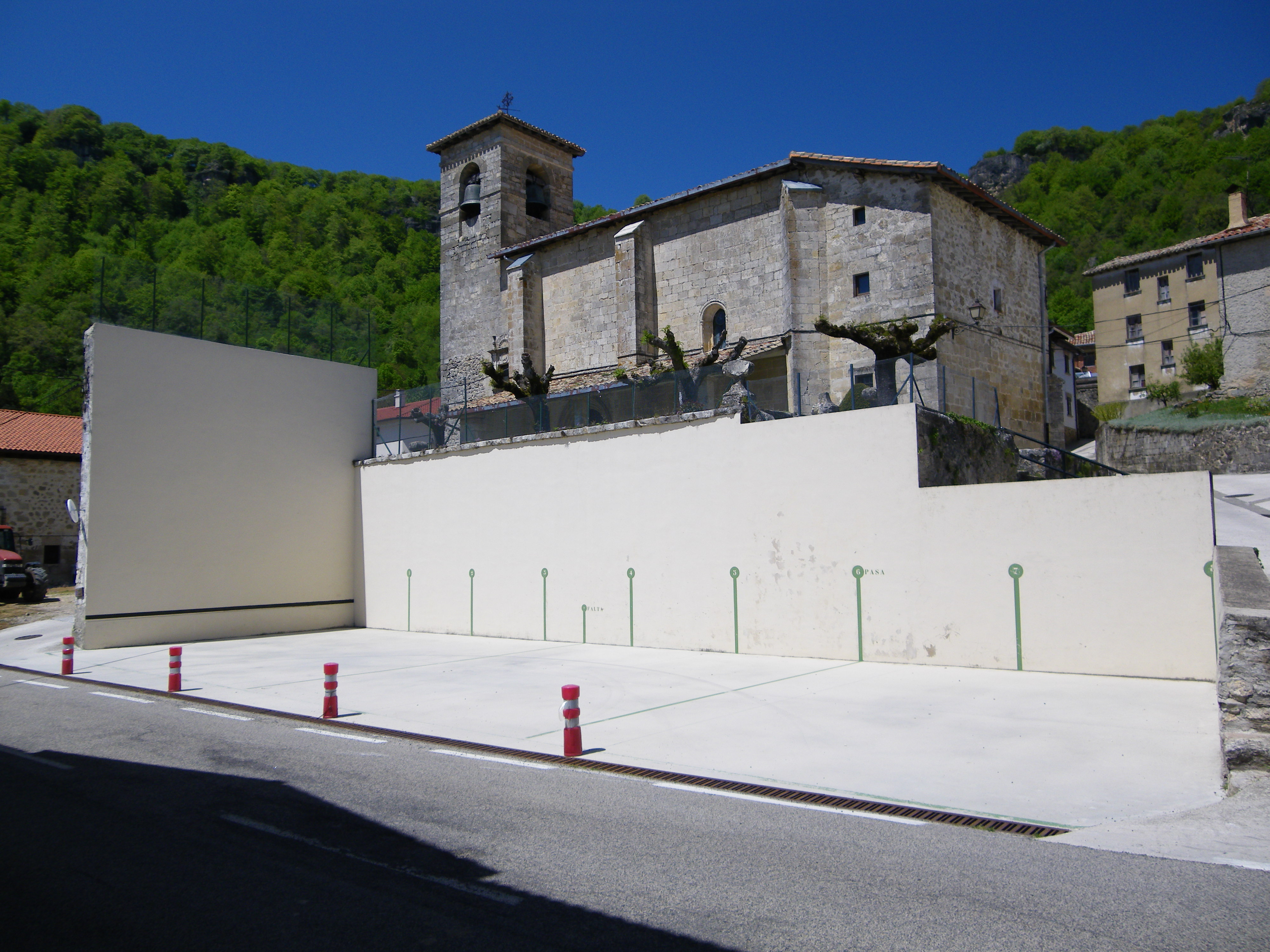 Pilotalekua eta eliza, Aranaratxe, Ameskoa Ibarra, Nabarra, Euskal Herria.